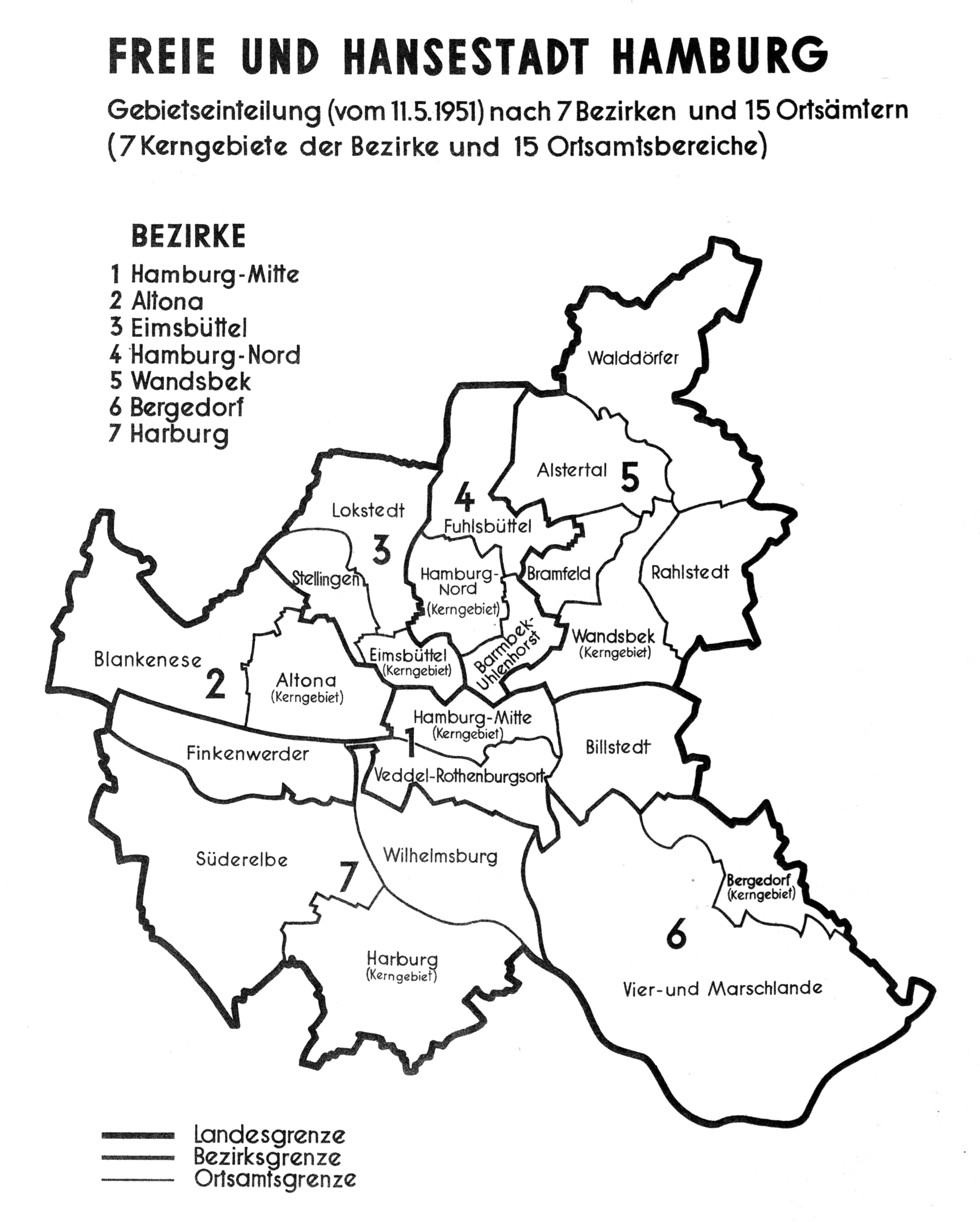 Freie und Hansestadt Hamburg Gebietseinteilung (vom 5.11.1951) nach 7 Bezirken und 15 Ortsämtern (7 Kerngebiete der Bezirke und 15 Ortsamtsbereiche)